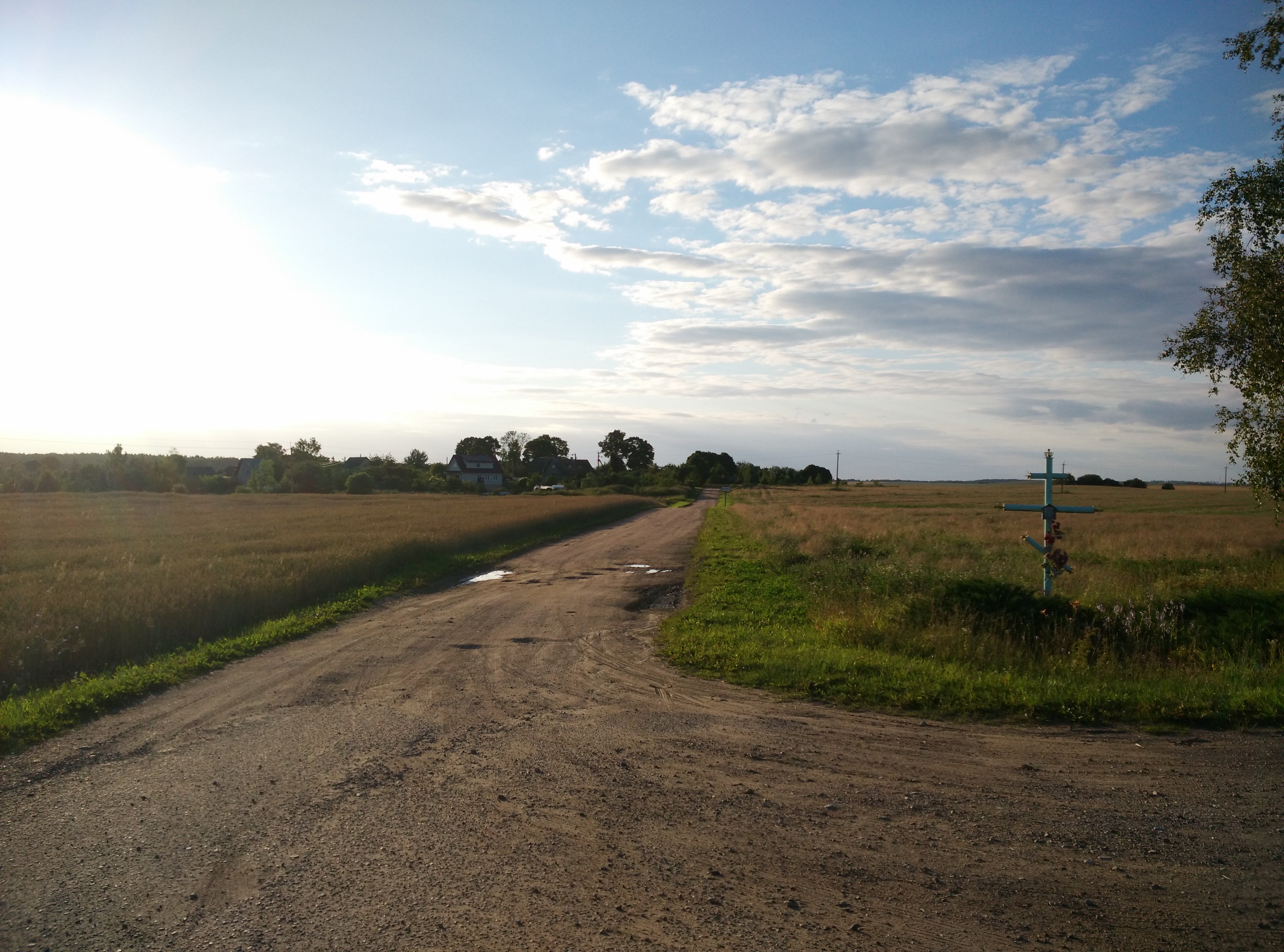 Вёска Махоўка, Наваольскі сельсавет, Пухавіцкі раён.